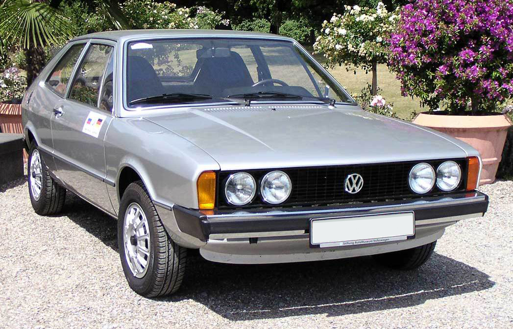 Volkswagen Scirocco built 1973